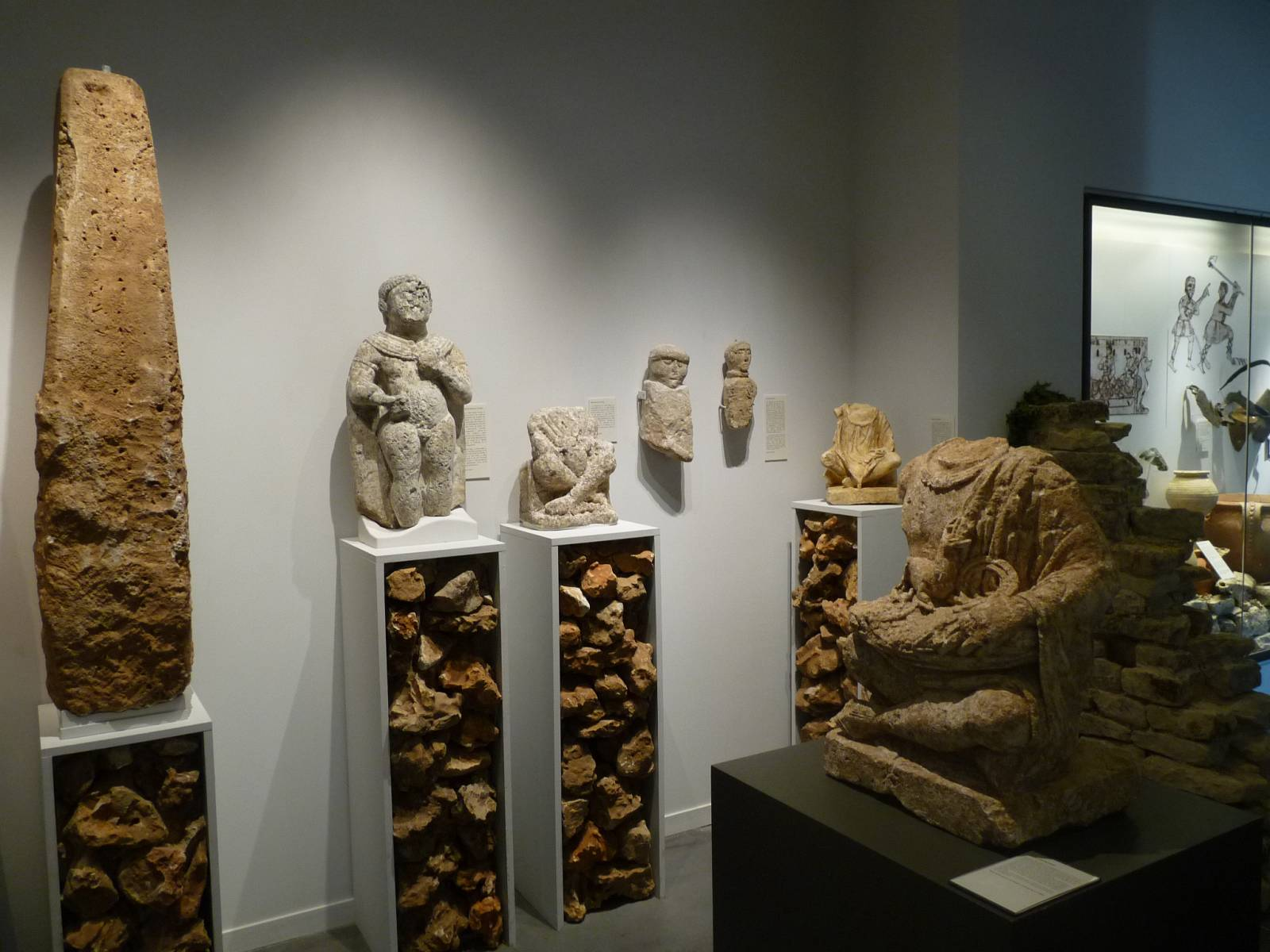 musée des Beaux-Arts d'Angoulême, Charente, France. Stèle gauloise de Bel-Air (L'Isle-d'Espagnac), dieux assis du Bas-Empire, dont le dieu assis de Verteuil à droite